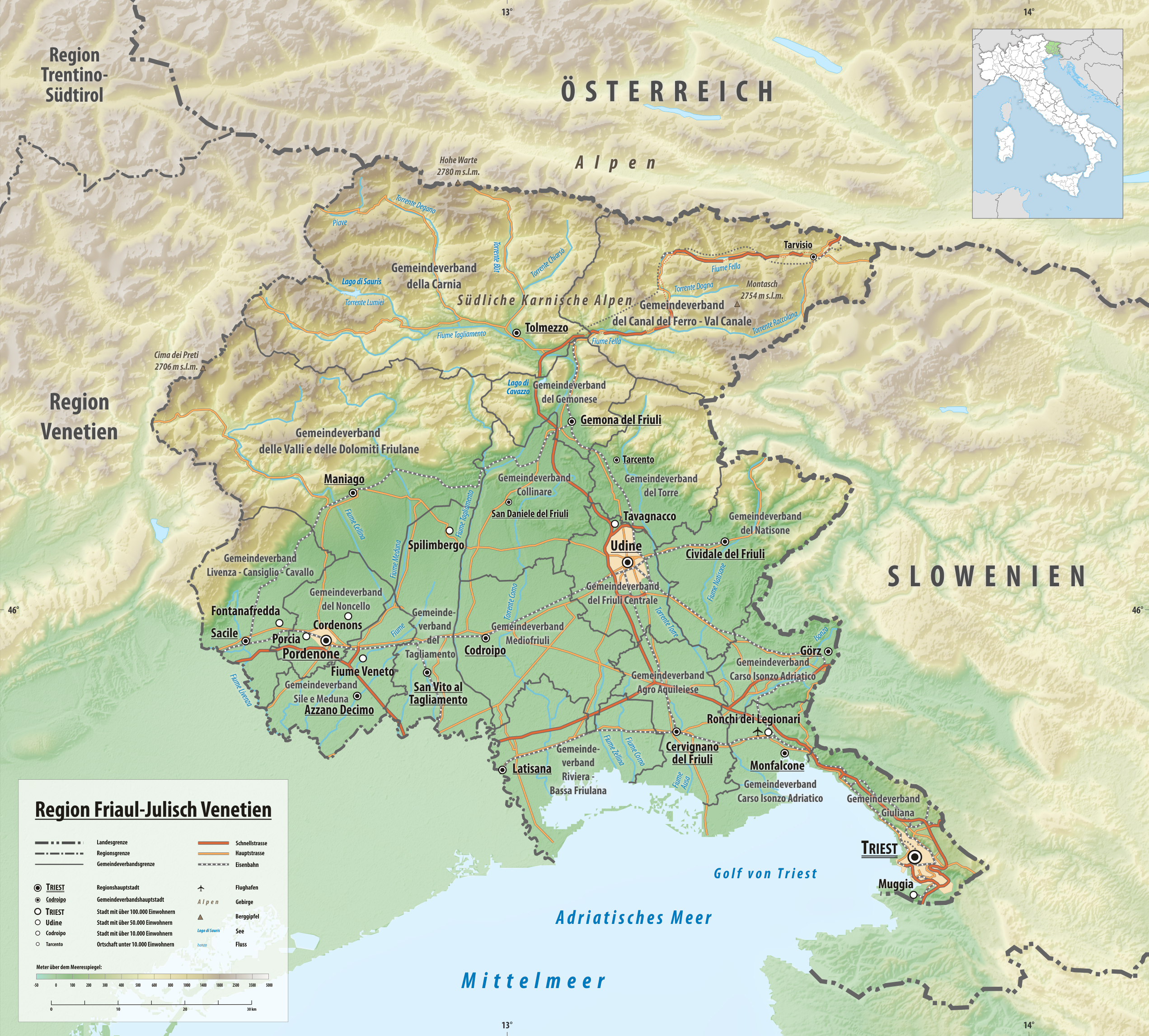 Reliefkarte der Region Friaul-Julisch_Venetien Topographischer Hintergrund: NASA Shuttle Radar Topography Mission (public domain). SRTM3 v.2.